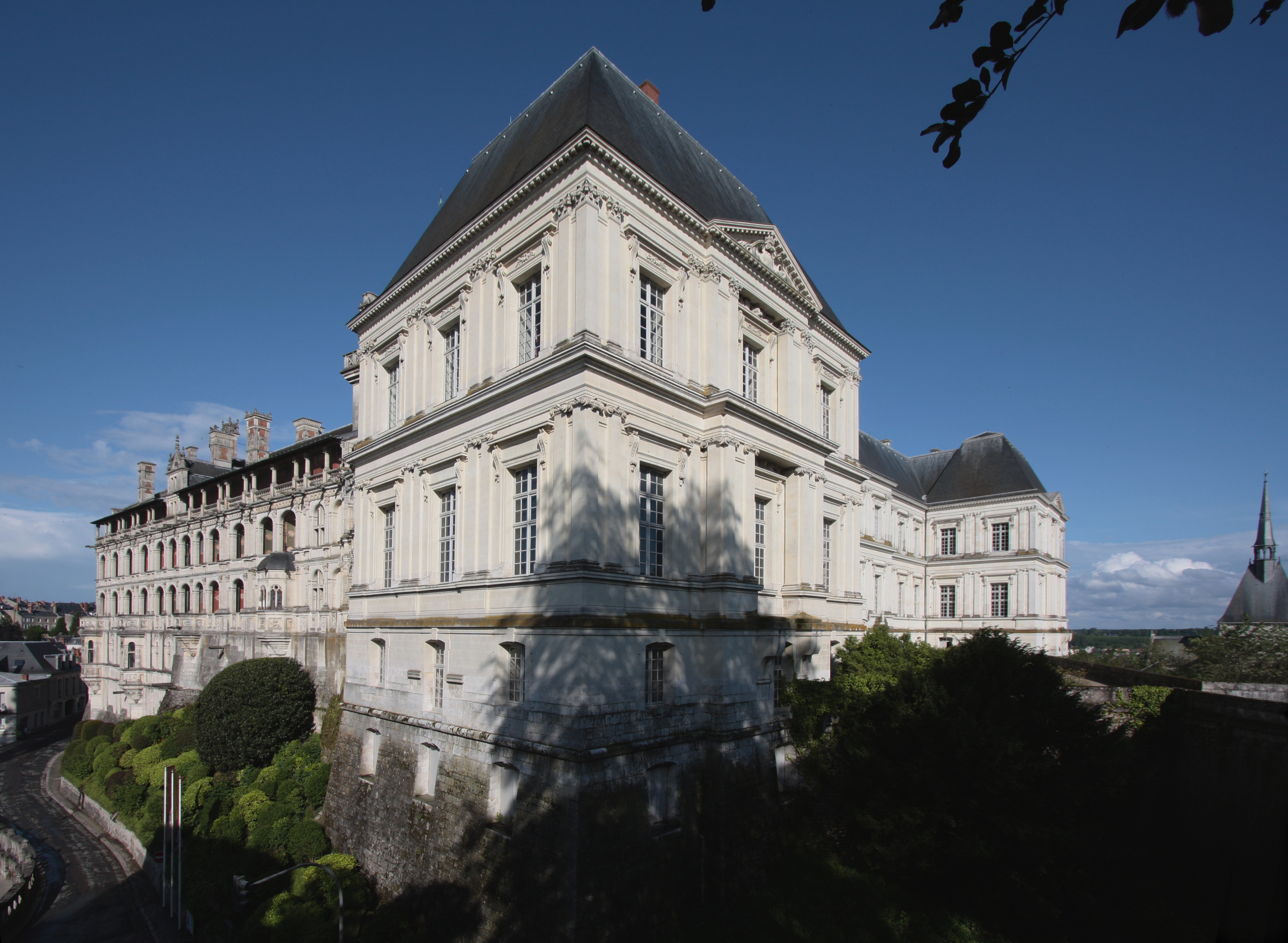 Schloss Blois, Departement Loir-et-Cher/Frankreich - Aussenansicht mit Loggienfassade (Flügel Franz I.) und Fassade des Flügels Gaston d'Orleans